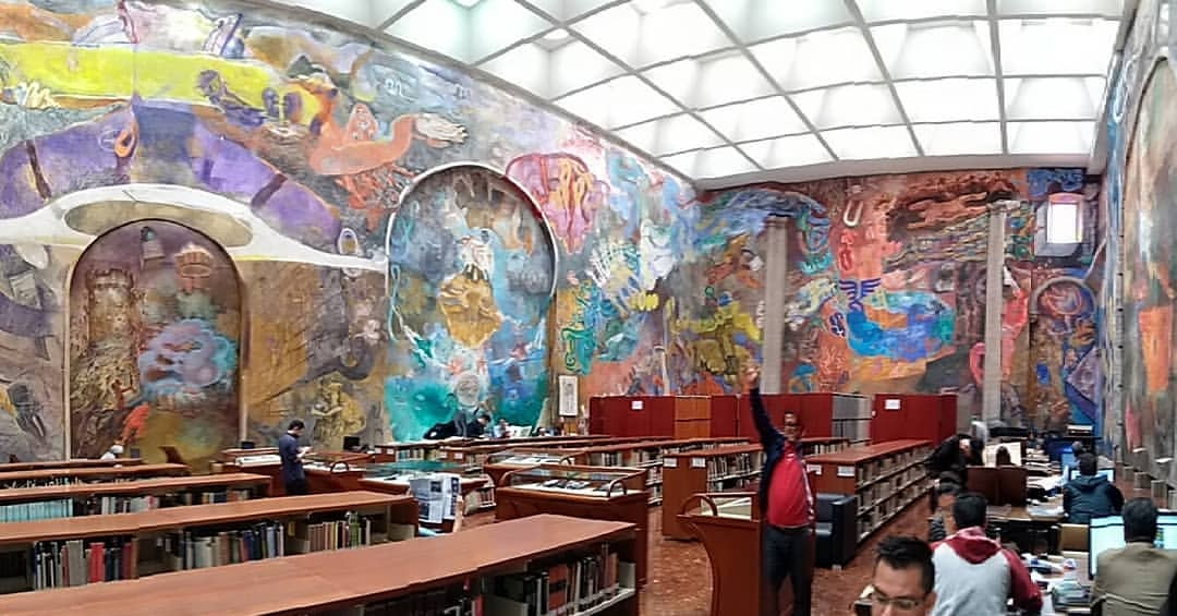 Foto del Interior de la Biblioteca Miguel Lerdo de Tejada